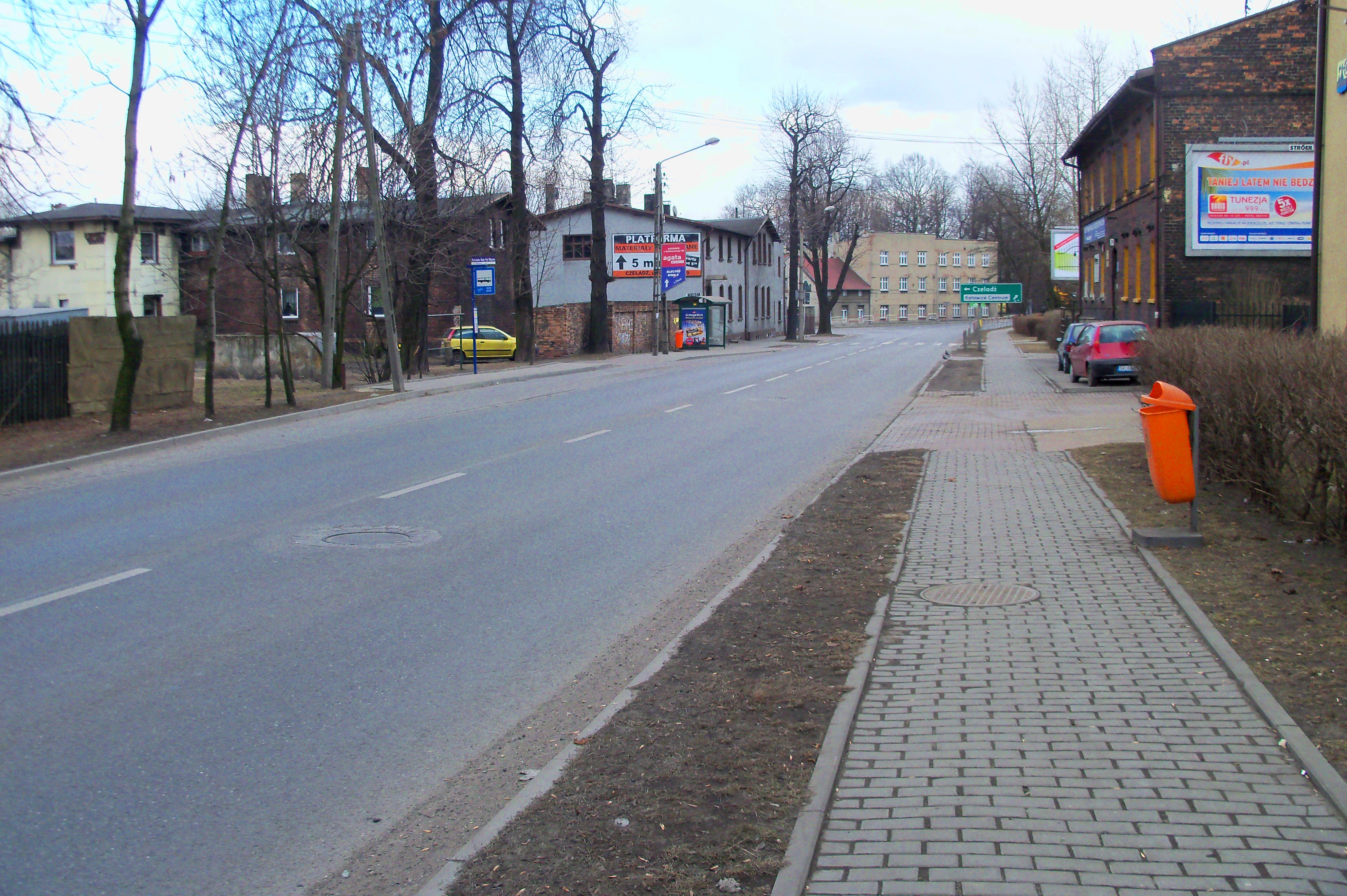 Ulica Strzelców Bytomskich w Katowicach-Dąbrówce Małej